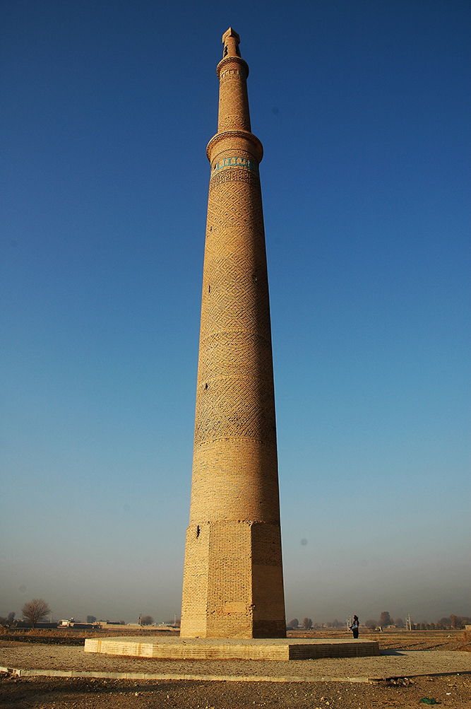 مناره زیار